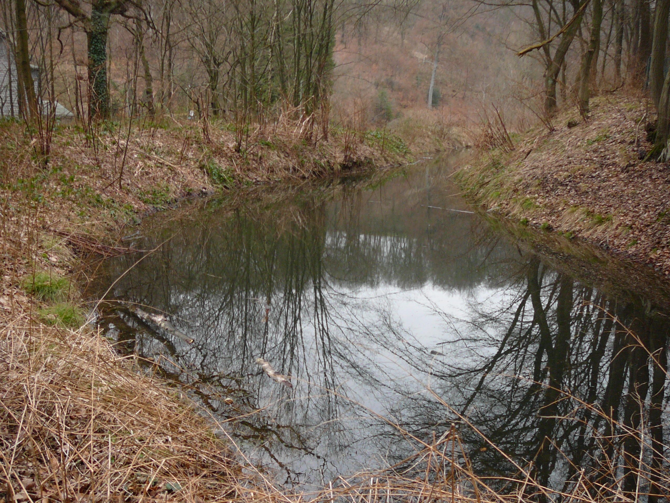 Zillertaler Straße, Wuppertal